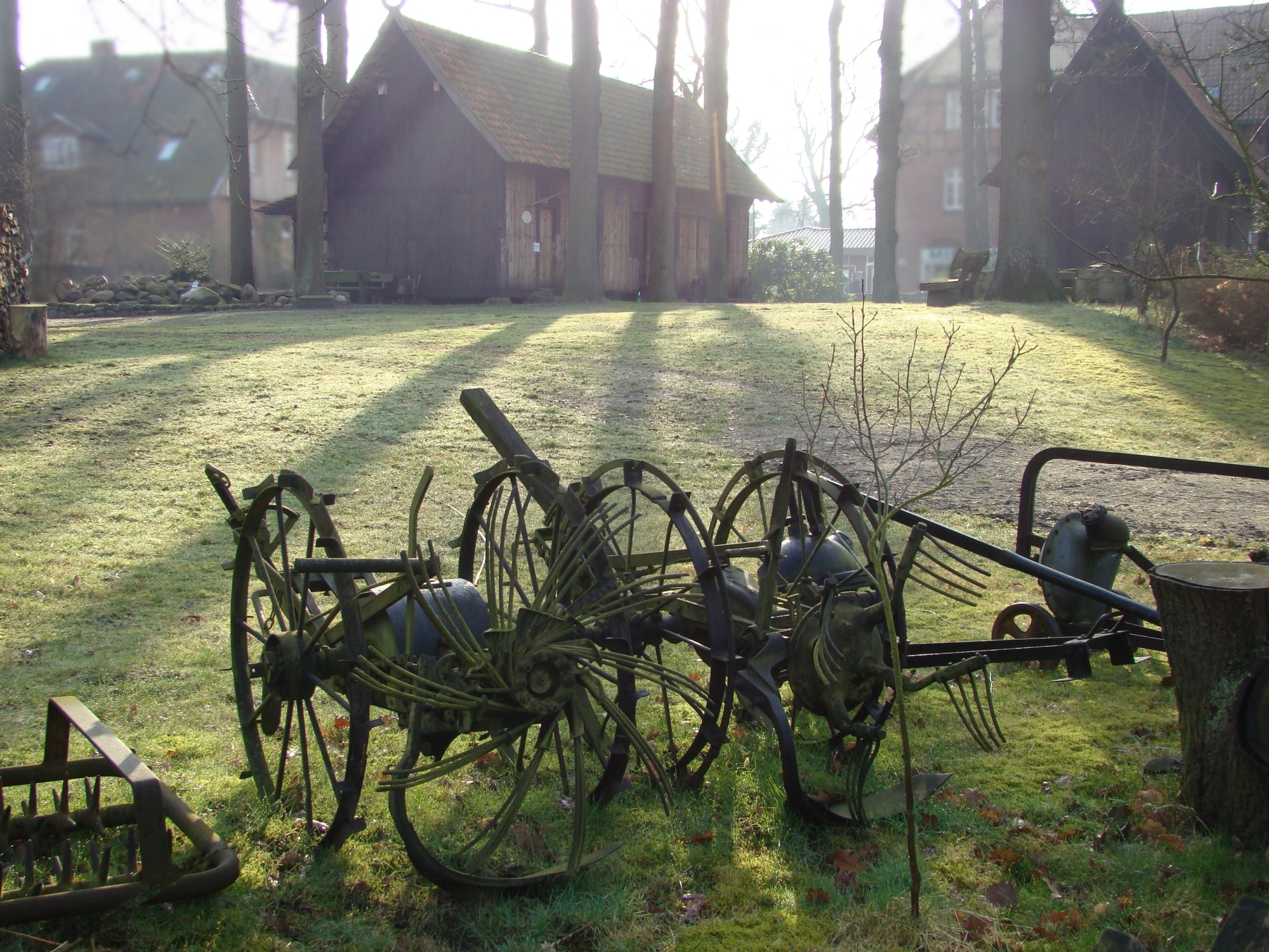 Kartoffelroder und weitere landwirtschaftliche Geräte im Außenbereich des Heimatmuseums Hermannsburg, Hermannsburg, Niedersachsen, Deutschland